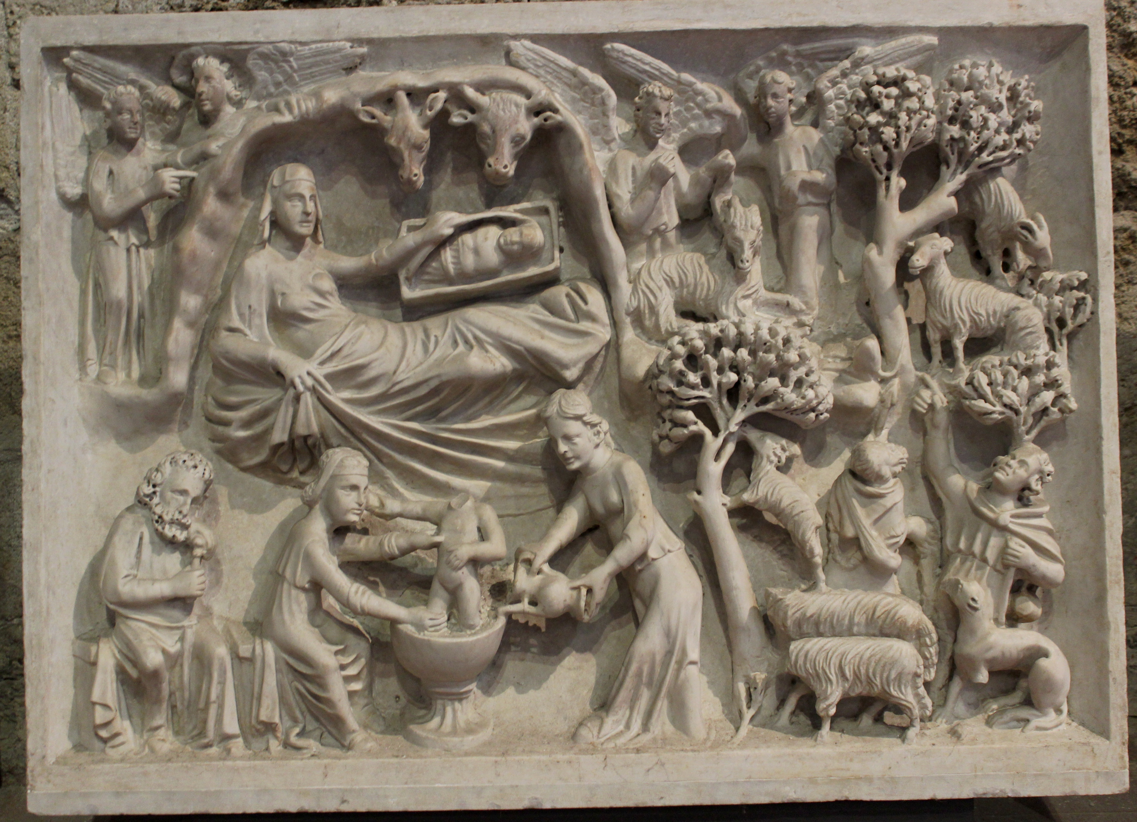 Pisa. Museo Nazionale di San Matteo, relieve del púlpito de San Michele in Borgo.